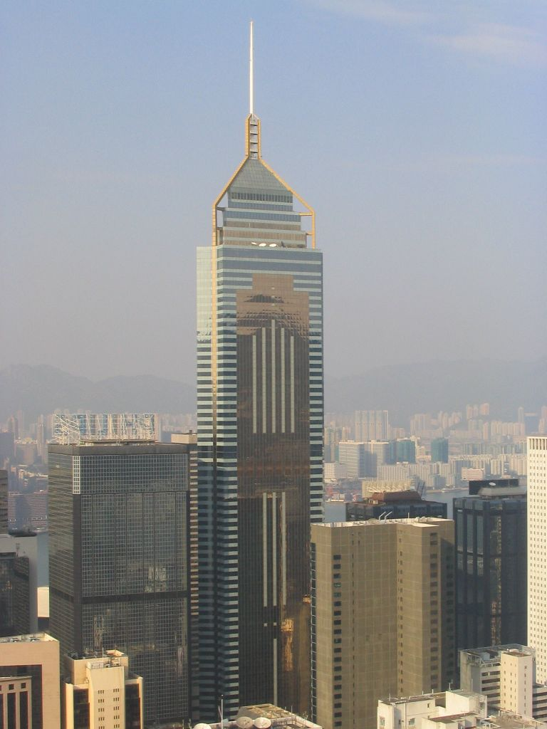 中環廣場(Central Plaza)